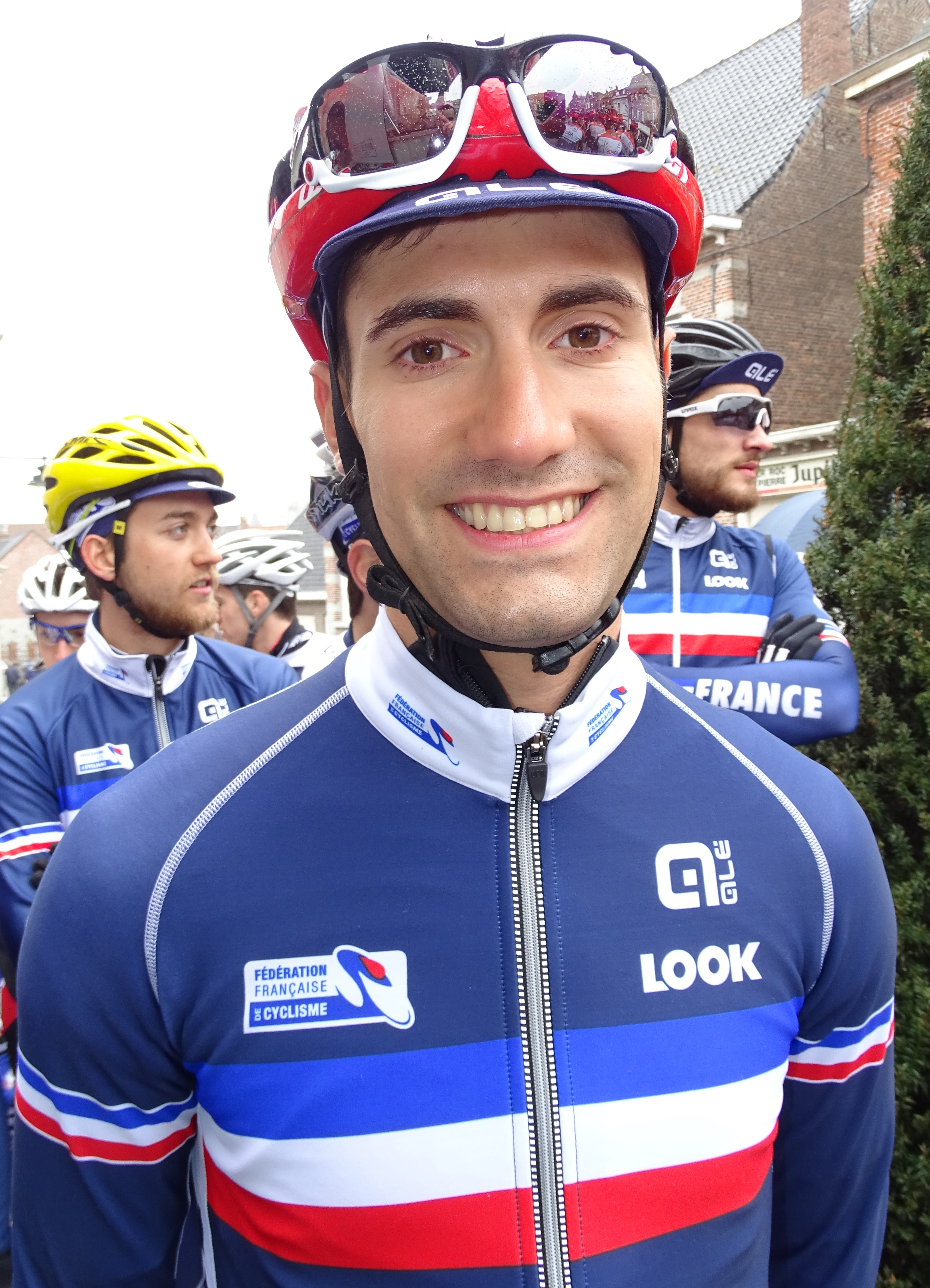 Triptyque des Monts et Châteaux 2015 Depicted person: Fabien Grellier Depicted team: Équipe nationale de France espoirs